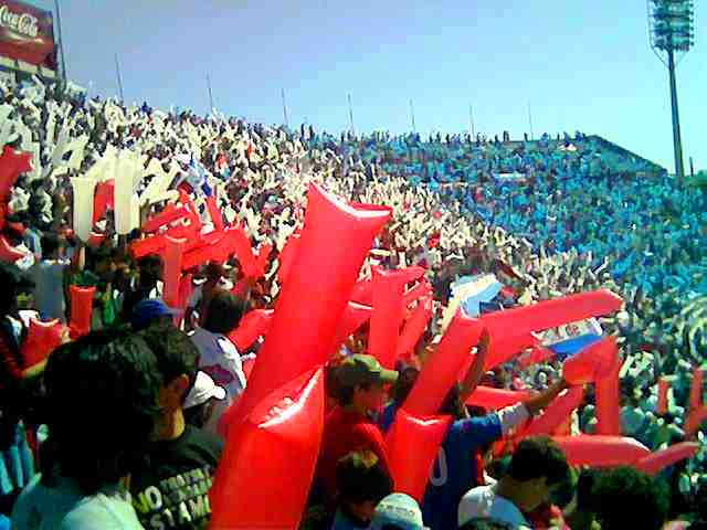 Foto de la hinchada del Club Nacional de Football durante el clásico del 27 de noviembre de 2007.